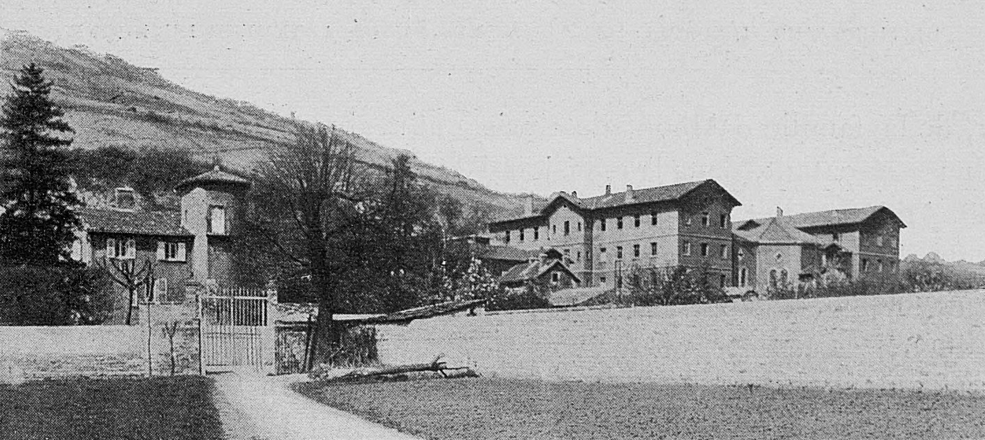 Dictionnaire illustré des communes du département du Rhône. Tome 1 / par MM. E. de Rolland et D. Clouzet.